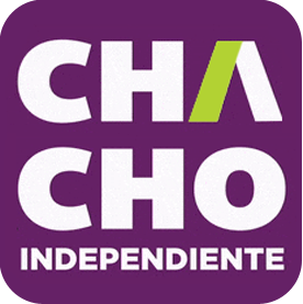 Logotipo de Chacho Barraza.